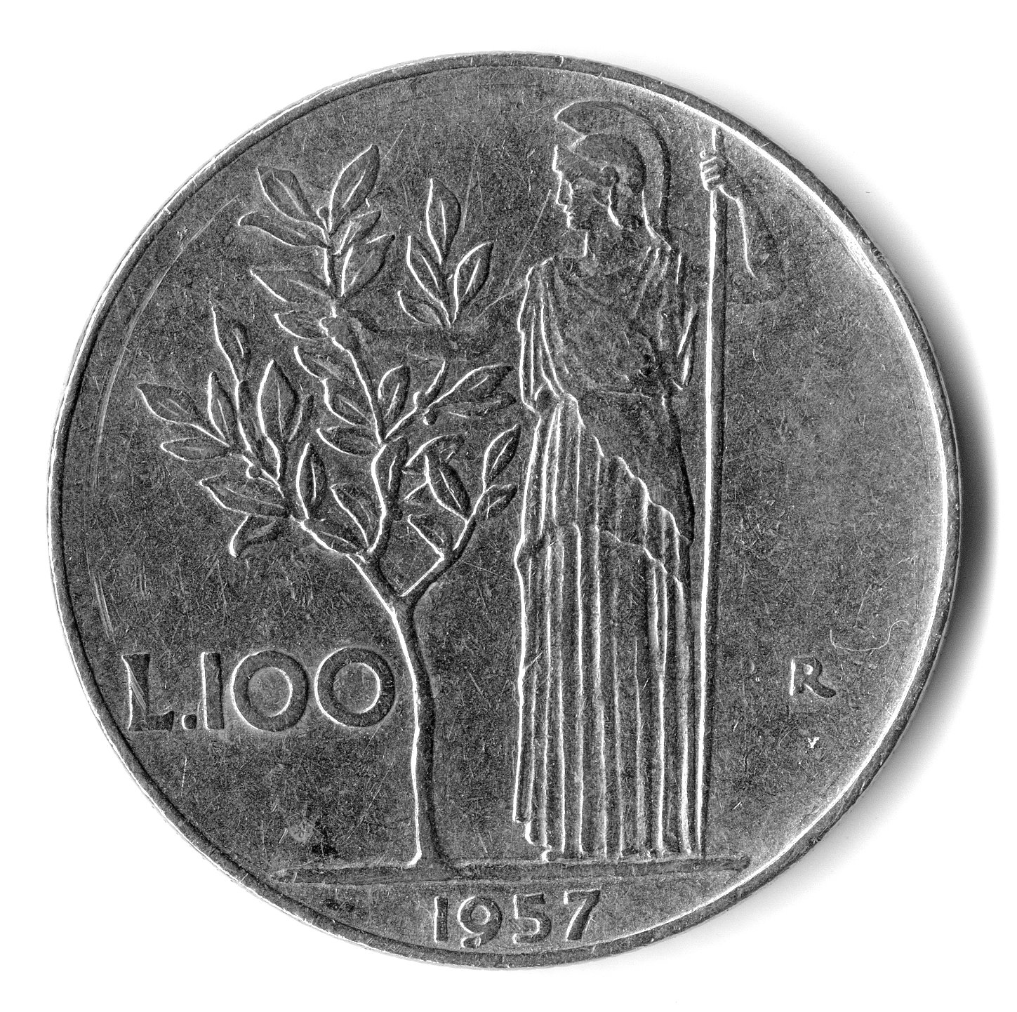 Italia - 100 lire - 1957